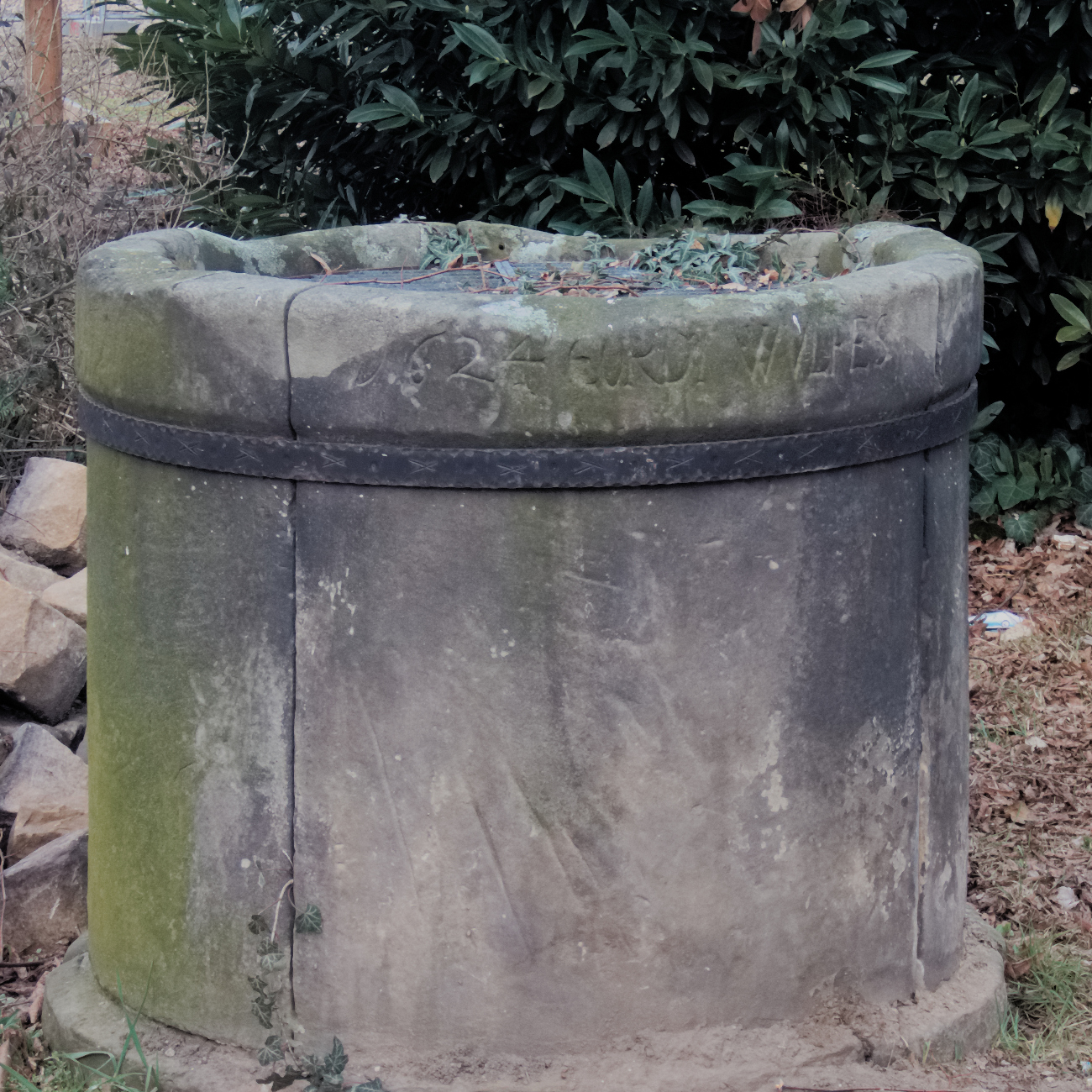 Der Brunnen aus dem Jahr 1624 ist ein Baudenkmal im Seelzer Stadtteil Letter.